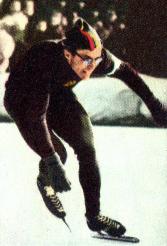 CAMPIONI DELLO SPORT 1969/70- n. 428 - LEPESCHKIN (URSS)